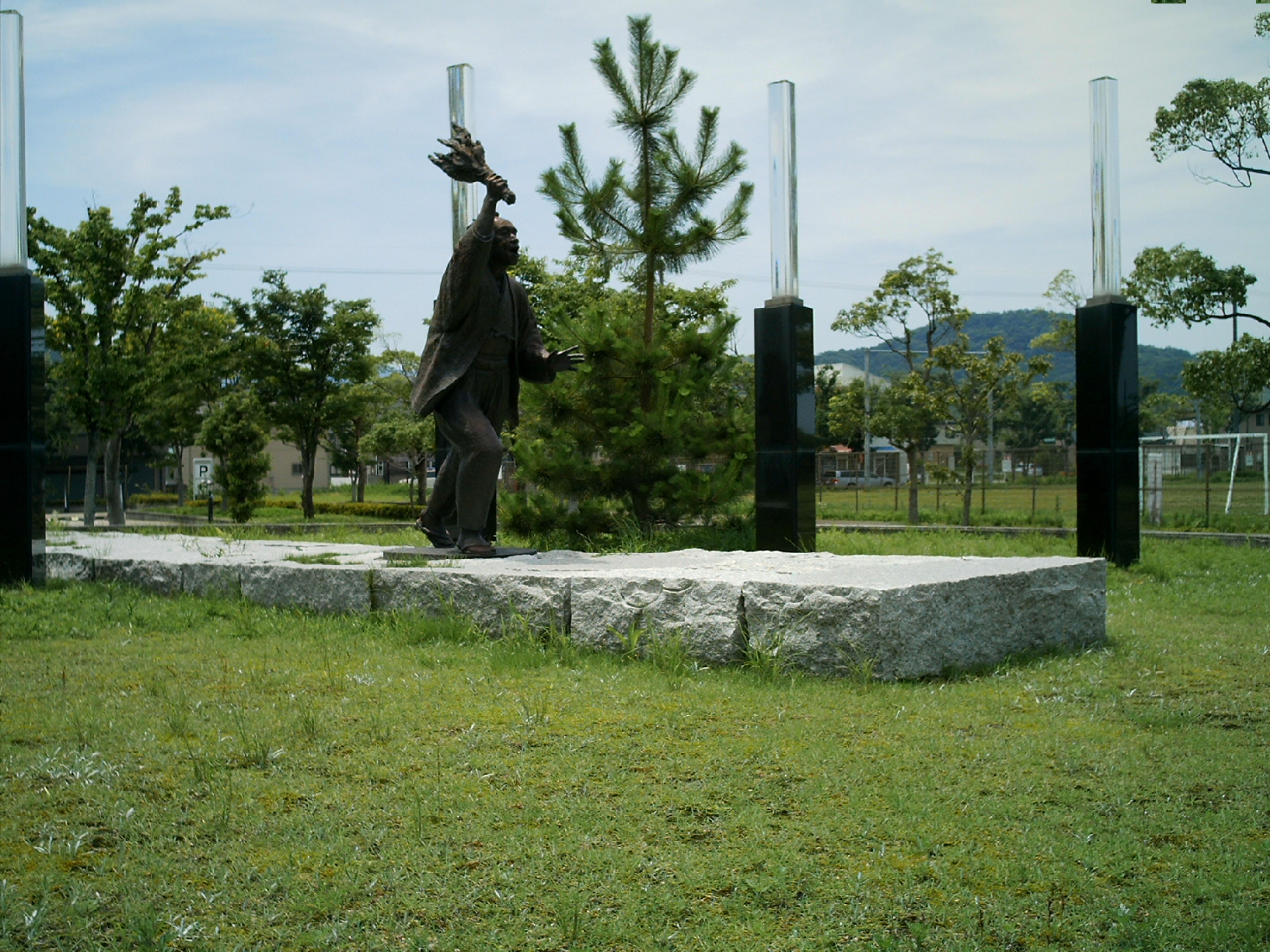 Hamaguti Goryou